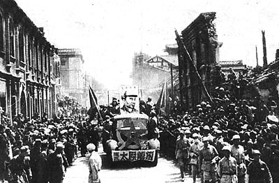 1949年4月24日，中国人民解放军攻占山西太原